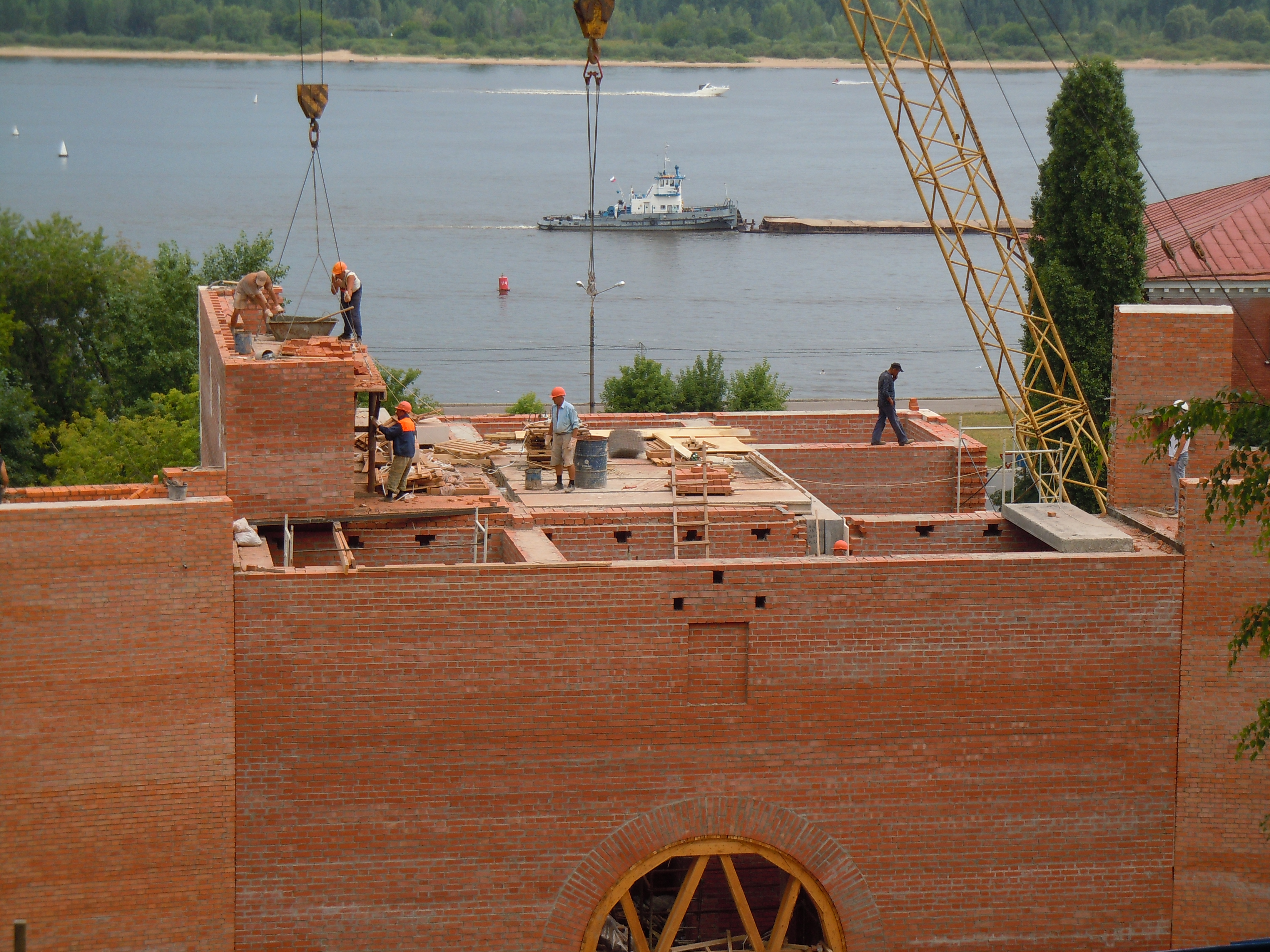 Реконструкция Зачатской башни.